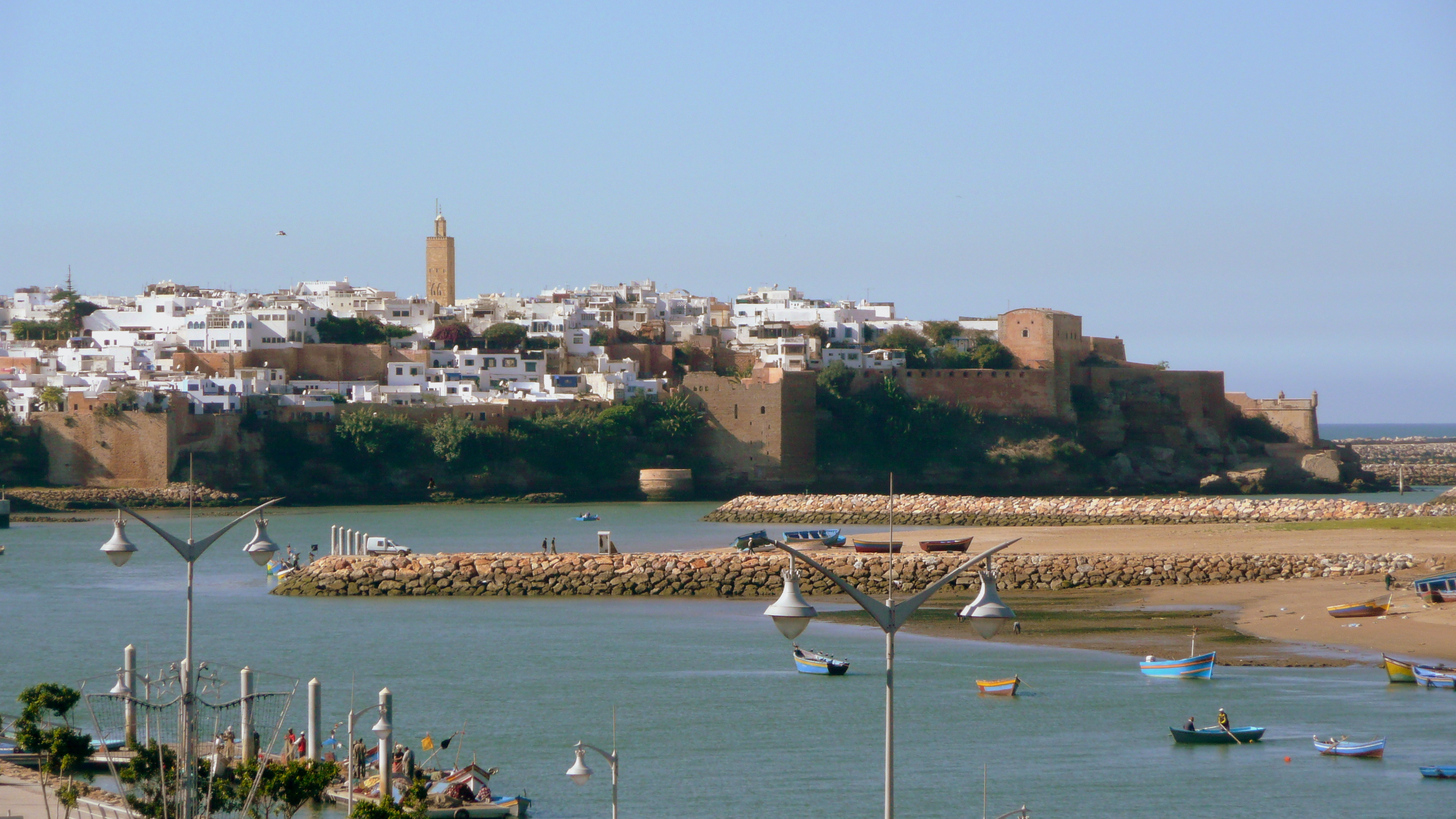 Kasbah des Oudaias et Oued Bou Regreg (Rabat, Maroc)